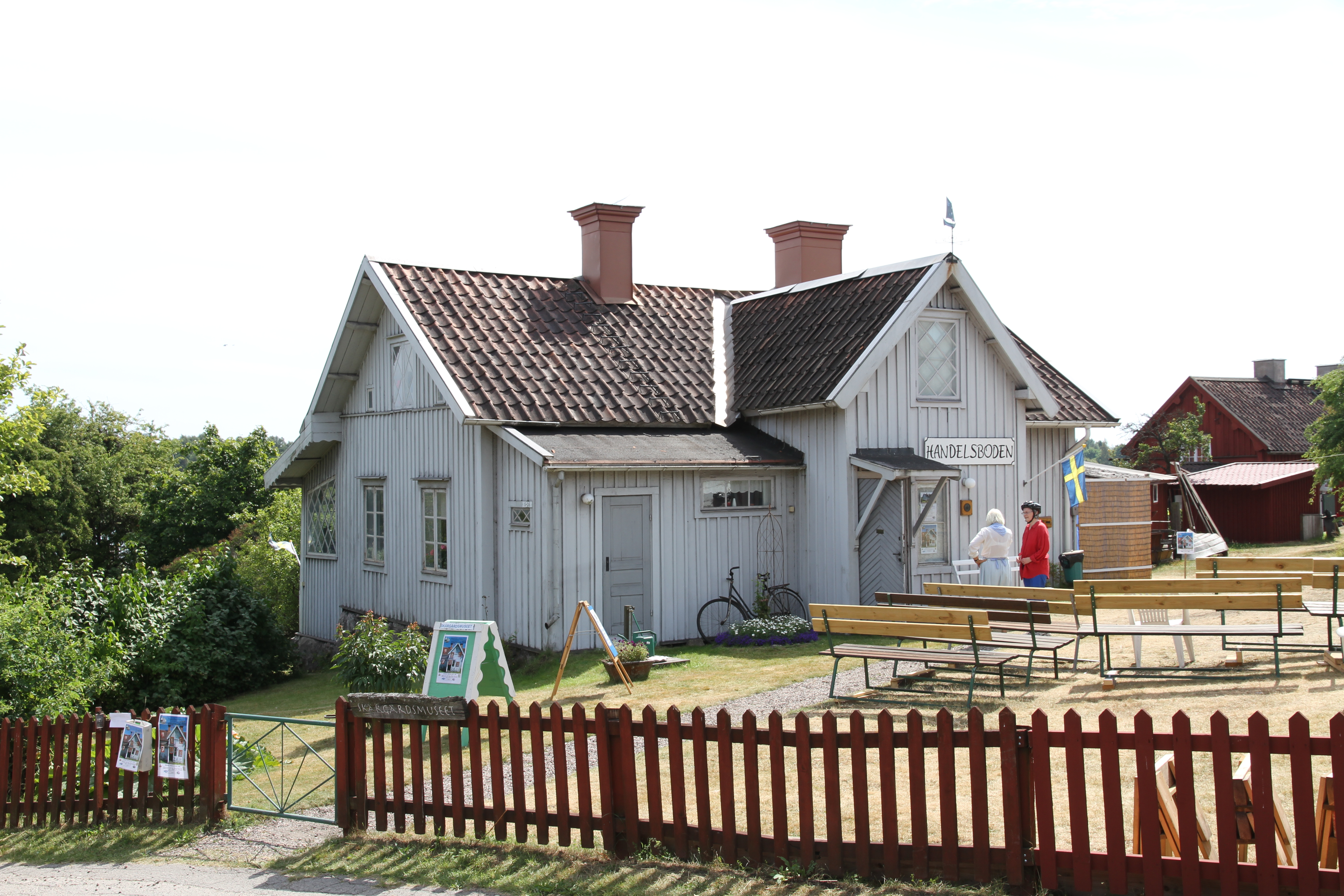 Skärgårdsmuseet Oxelösund 24 juli 2016